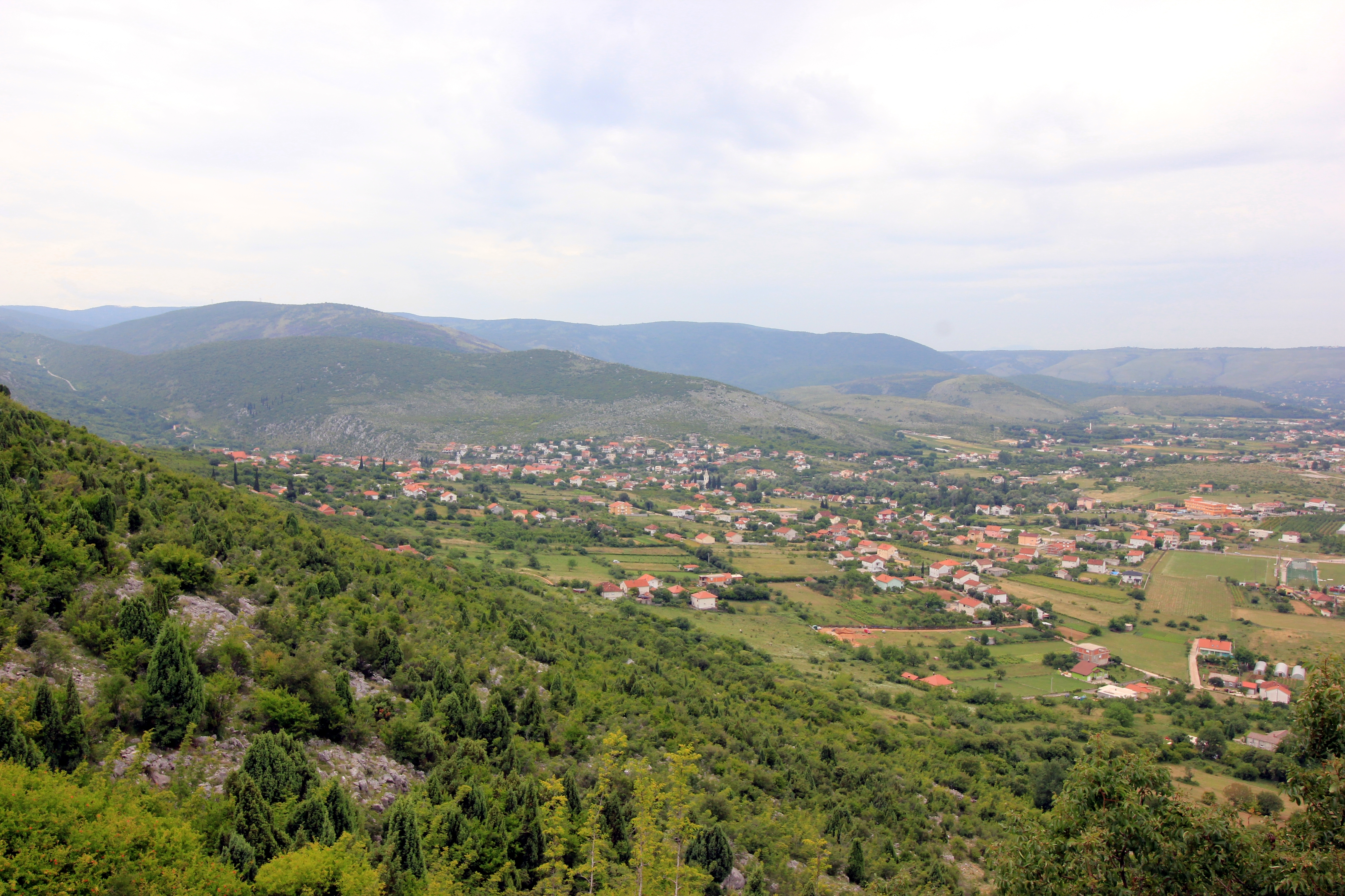 Blick auf Blagaj von der Straße nach Nevesinje